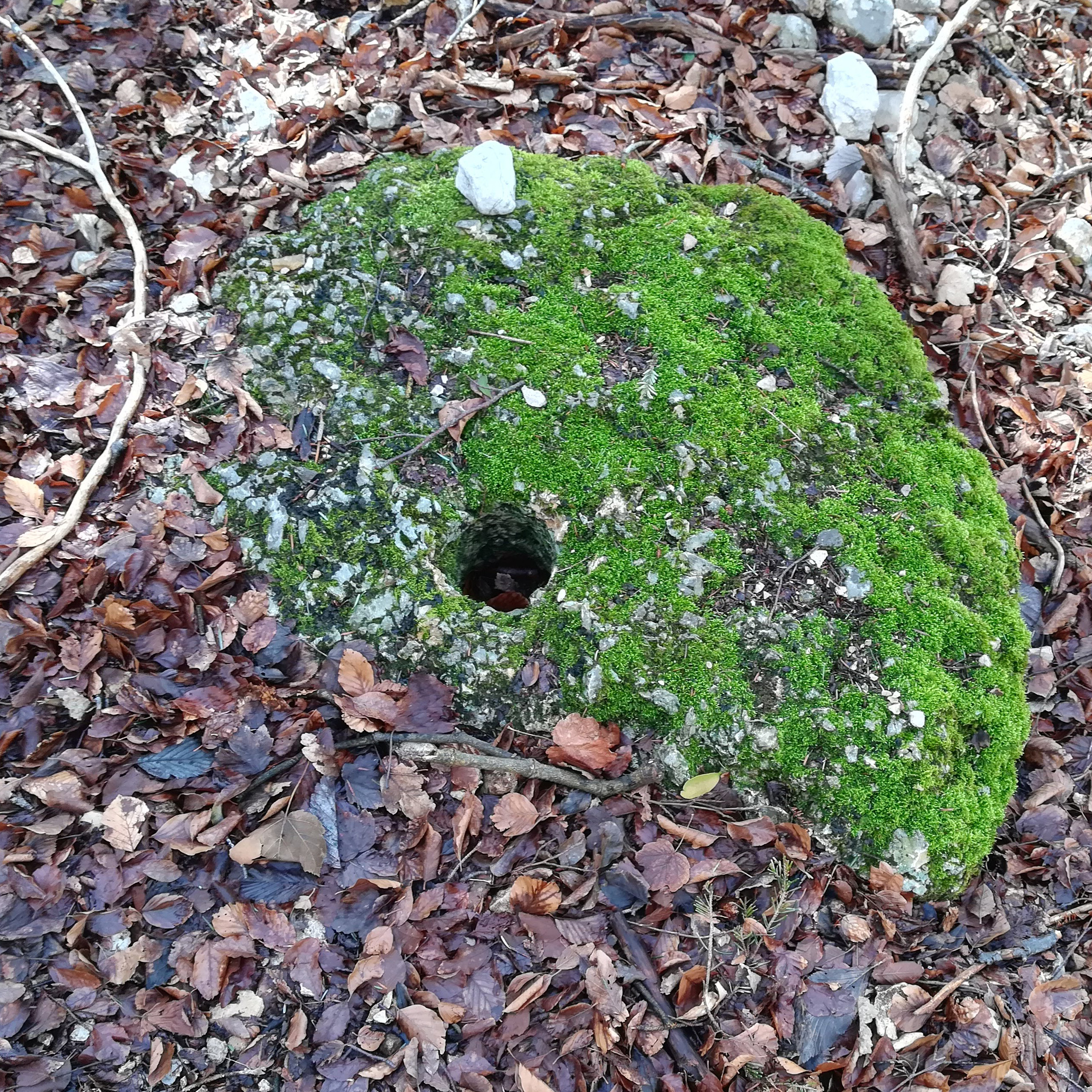 Une meule percée et accidentée (cassée) de La meulière des Dauphins à Mont Saint Martin